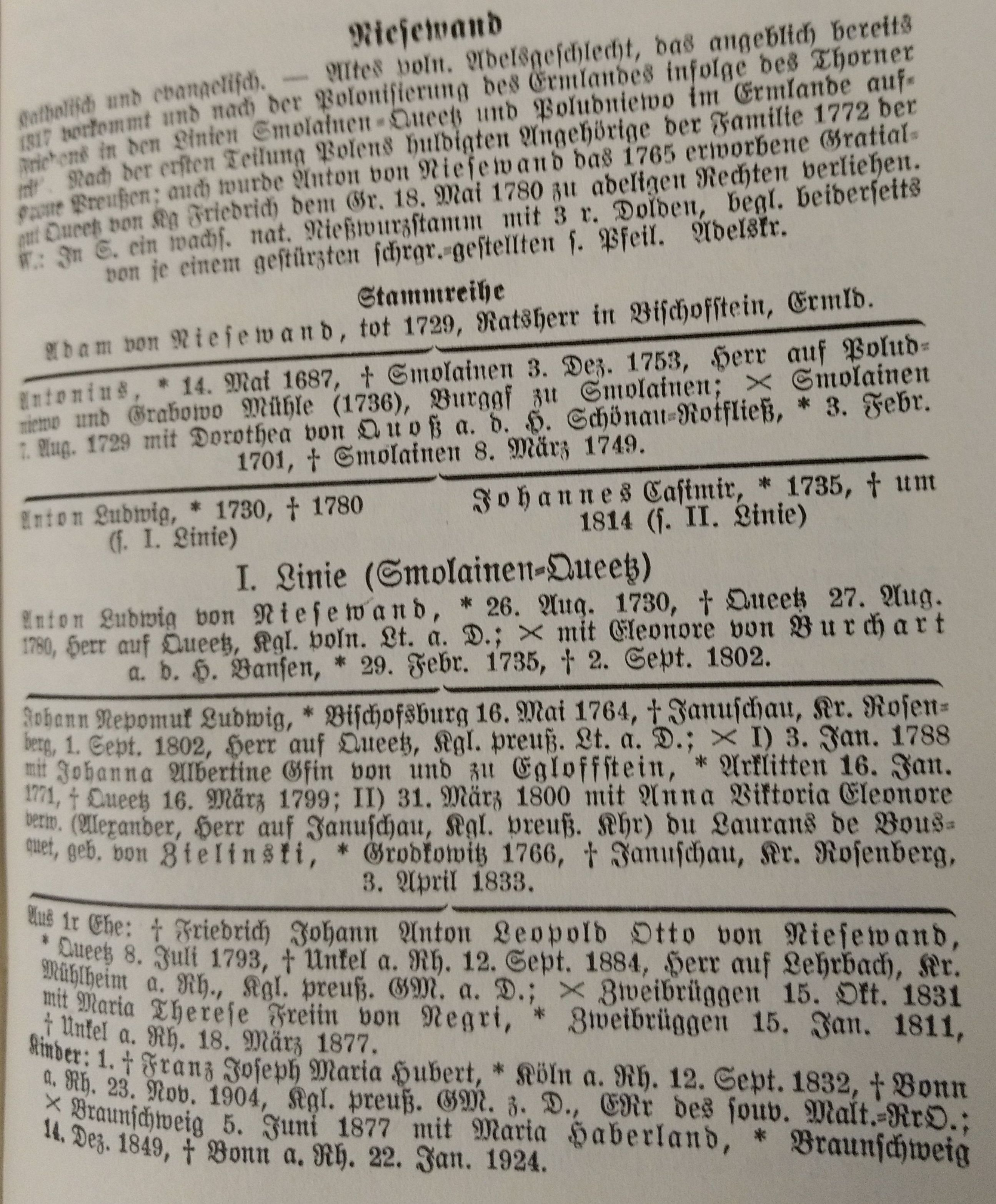 Niesewand. In: Gothaisches genealogisches Taschenbuch der briefadeligen Häuser, 1930, S. 599